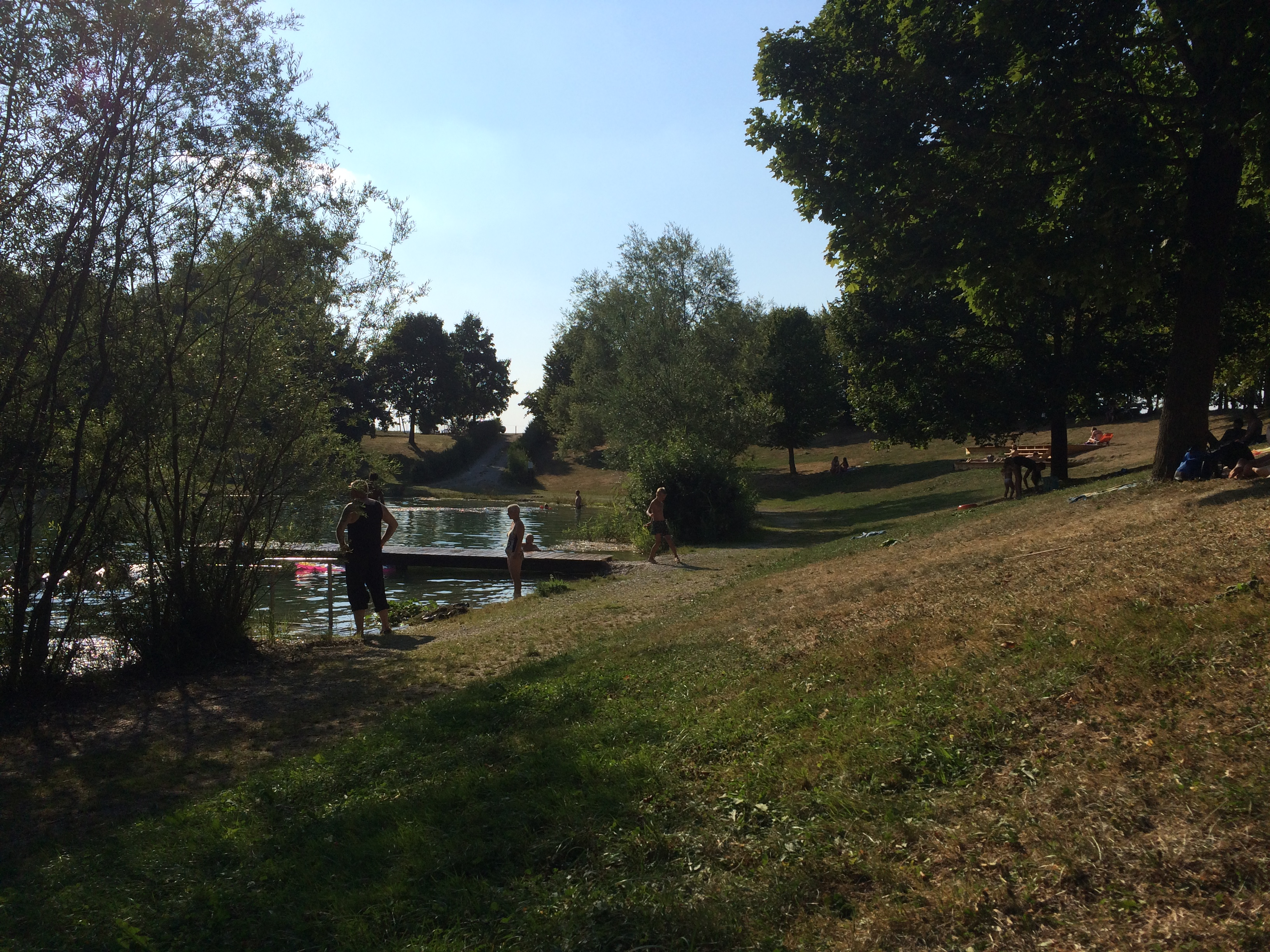 Künstlich geschaffener Badesee in Steinhöring (Oberbay.)